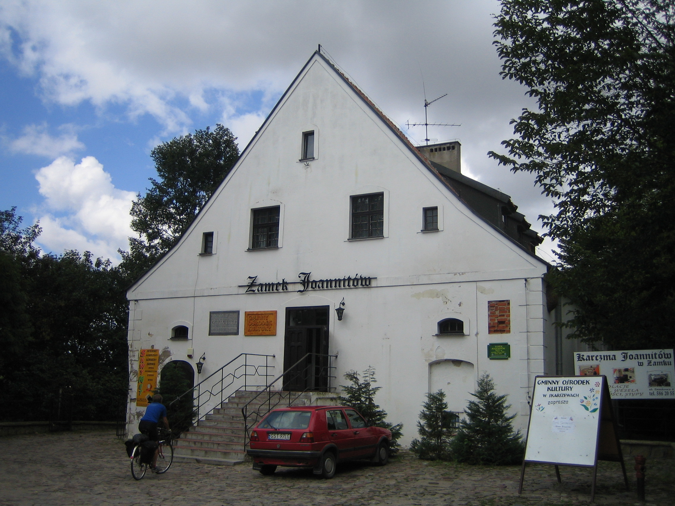 Skarszewy, dawny zamek, obecnie siedziba Gminnego Ośrodka Kultury.